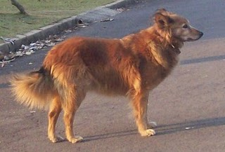 Cão da raça podengo crioulo, também conhecida como aracambé. É um exemplar de tamanho standard e pelo longo.